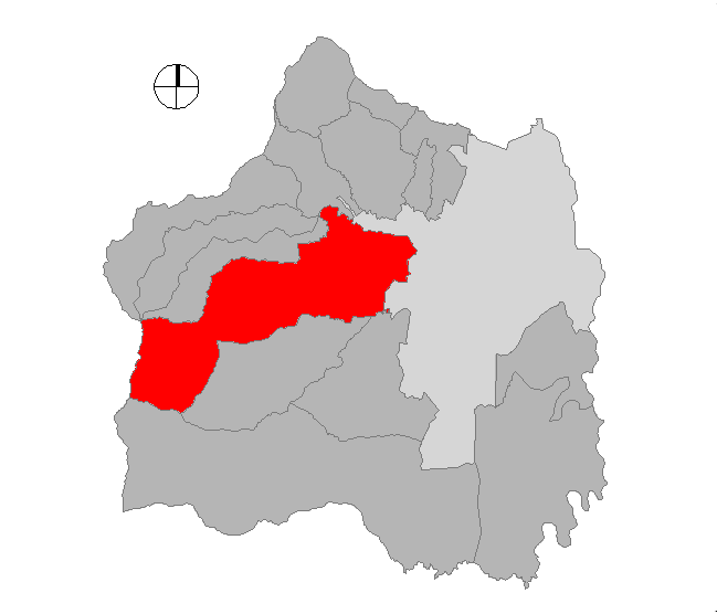 Corregimiento de Cali, Colombia